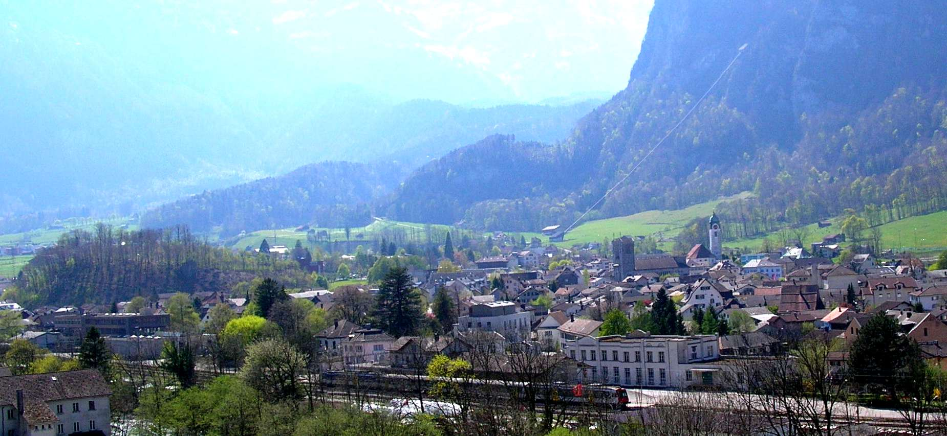 Ansicht auf Dorf Netstal GL